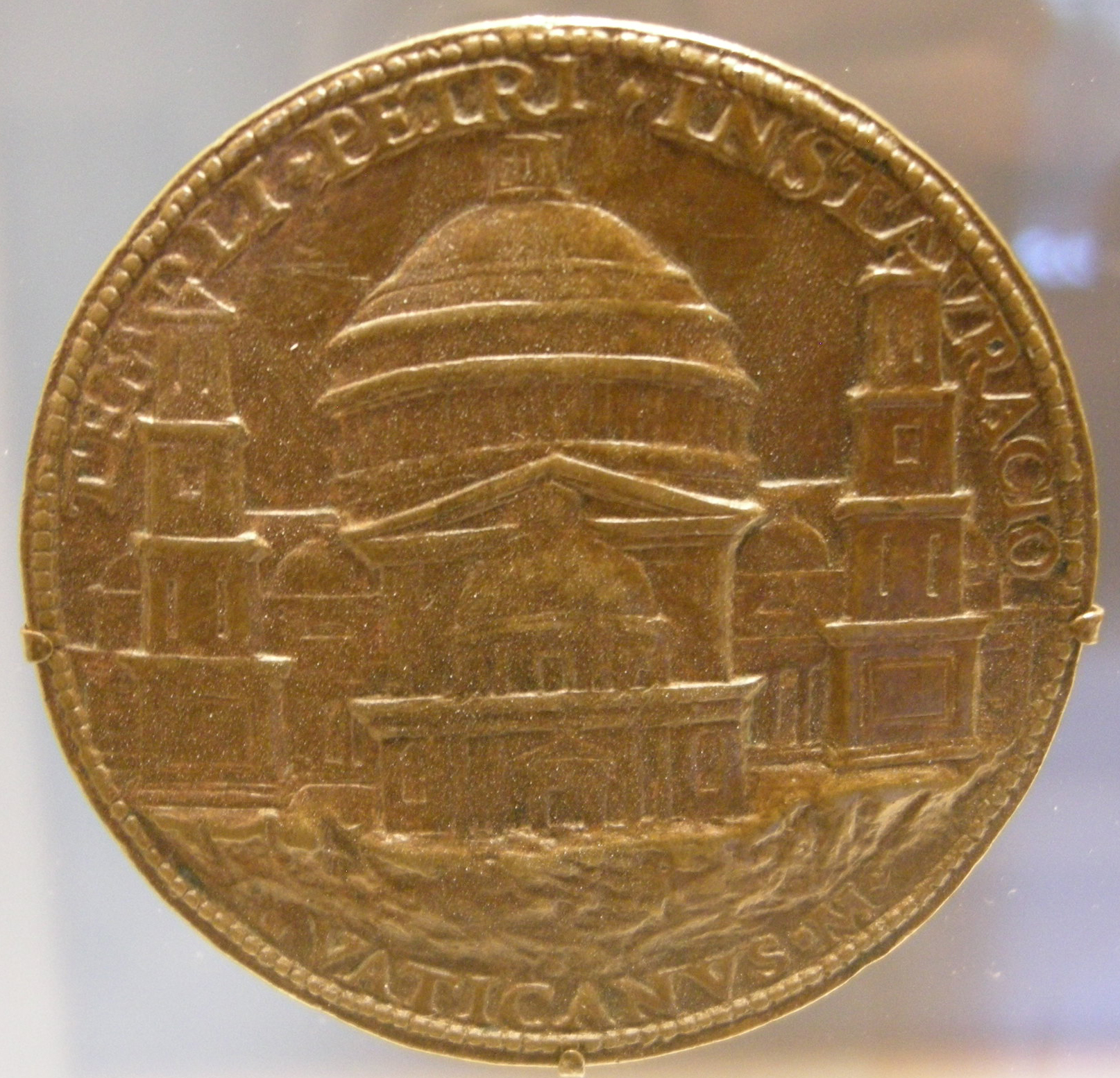 Caradosso (attr.), papa giulio II, 1506, verso, modello di san pietro secondo il progetto di bramante